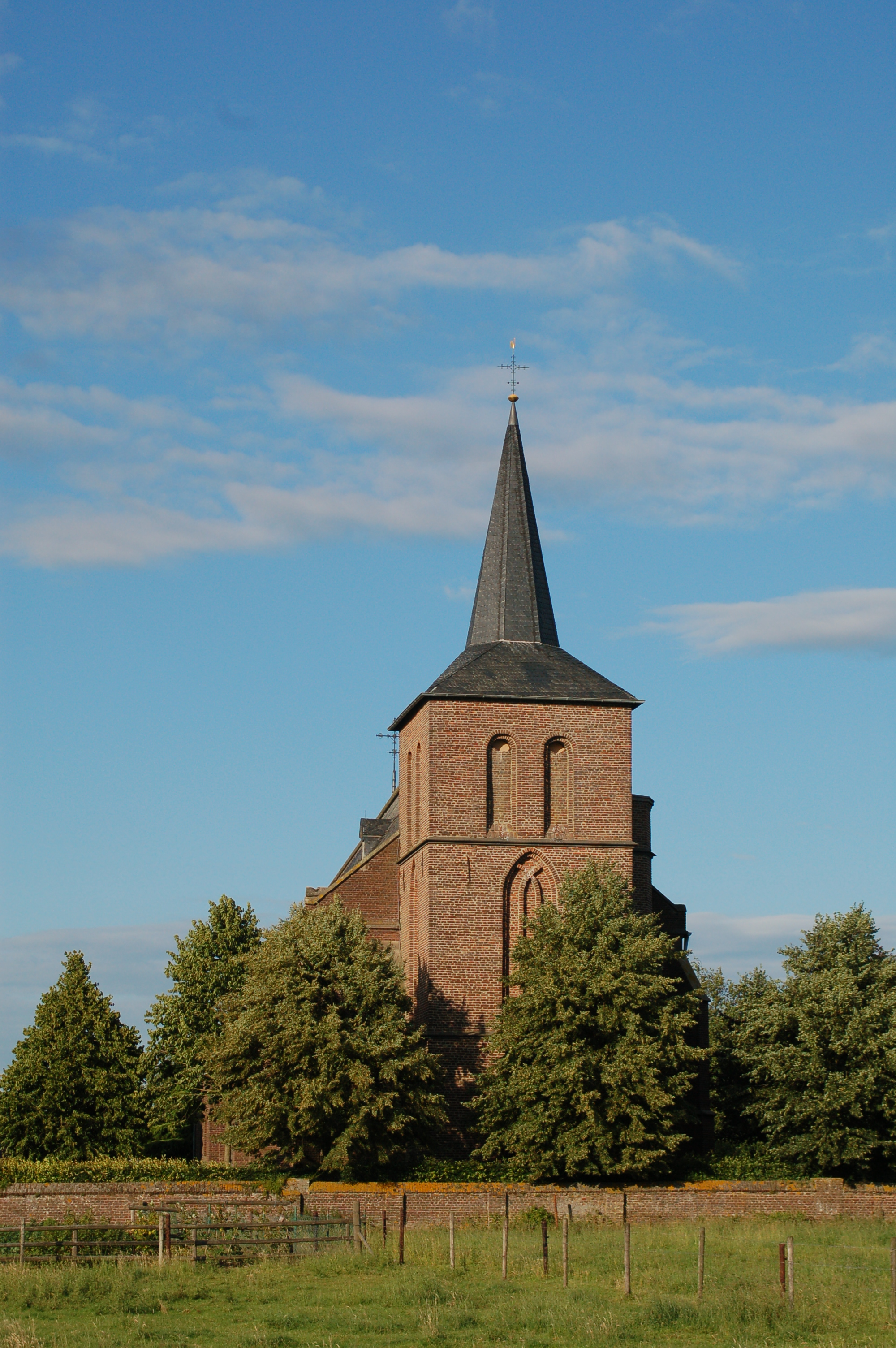 Der Kirchturm der katholischen Kirche in Wassenberg, Ortsteil Steinkirchen.